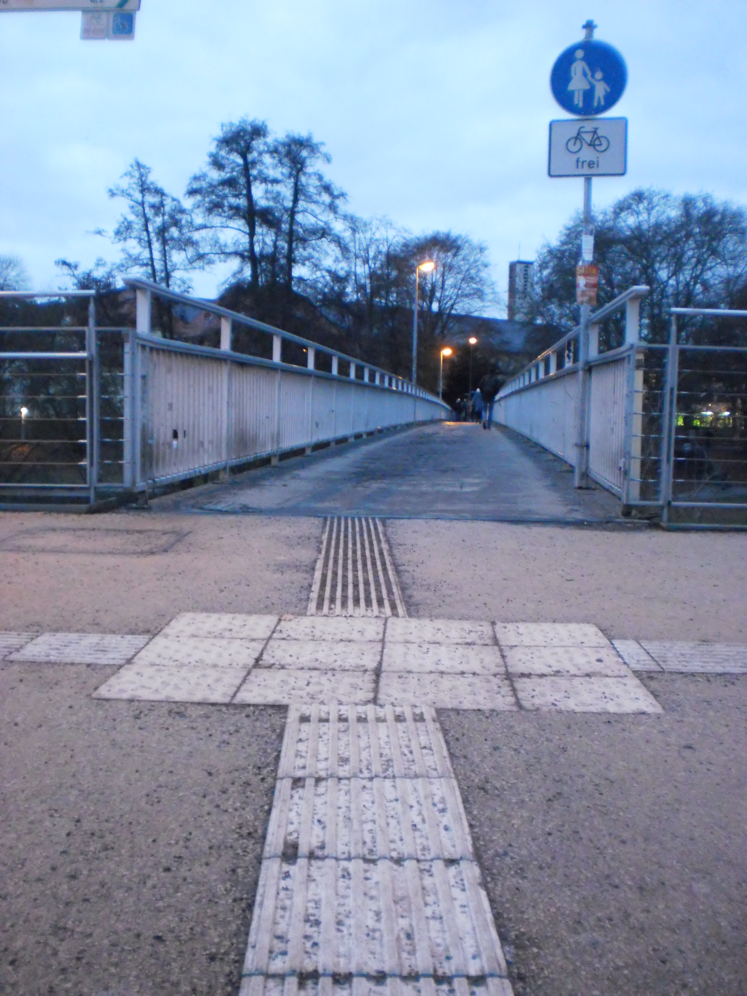 Die Abendroth-Brücke mit einem Aufmerksamkeitsfeld für Blinde vom Uferweg an der Uni-Mensa in Marburg und Freigabe des Fusswegs für Radler mit Langsamfahrt. Auch andere Brücken in Marburg wie der Hirsefeldsteg haben ein Blindenleitsystem an ihrem Zugang, damit die Orientierung erleichtert wird. Weitere Fotos von diesem Tag: 2017-01-12 in Germany oder global Photographs January 12, 2017.